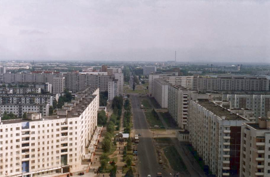 for severodvinsk